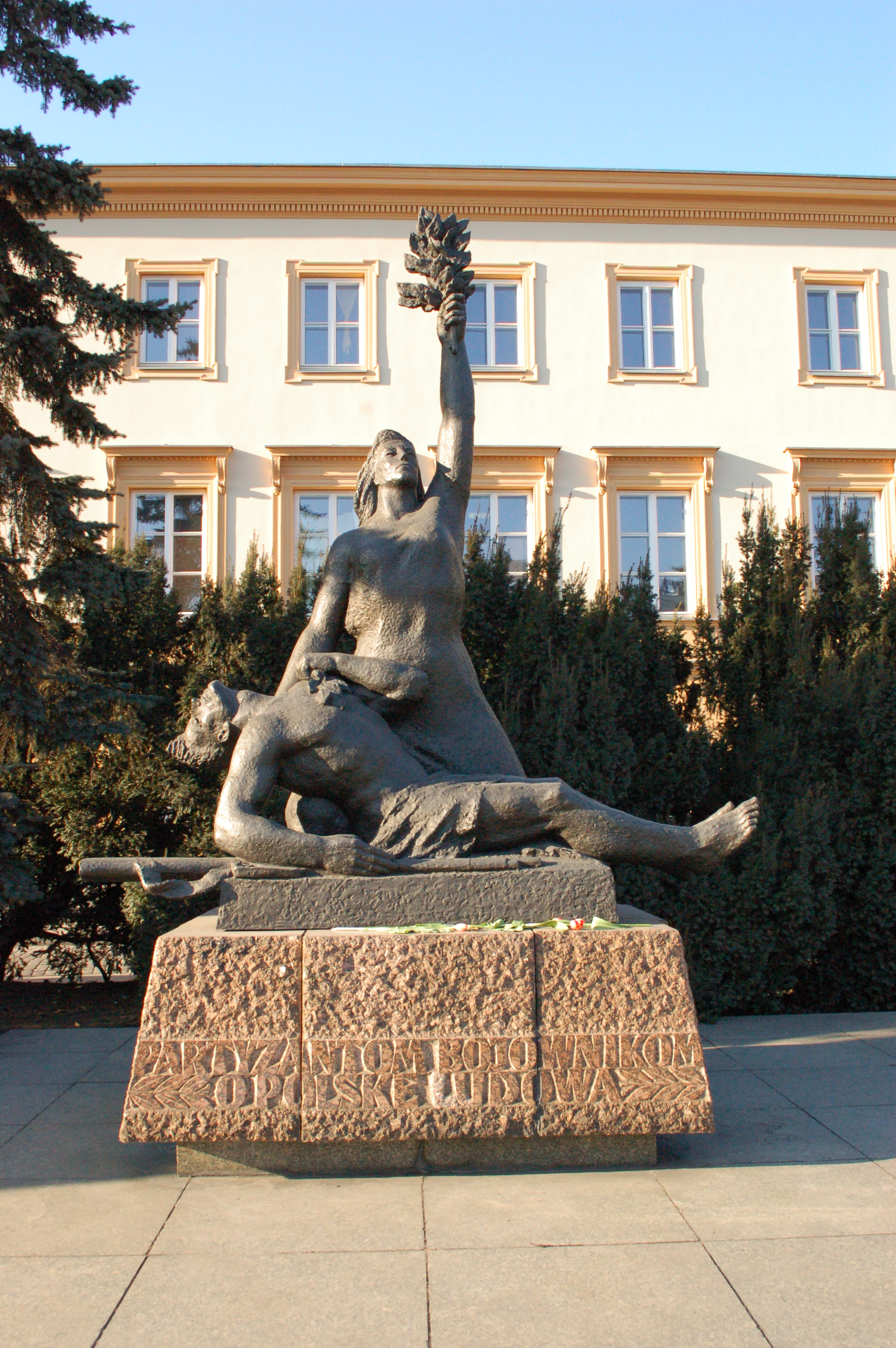 Warschau